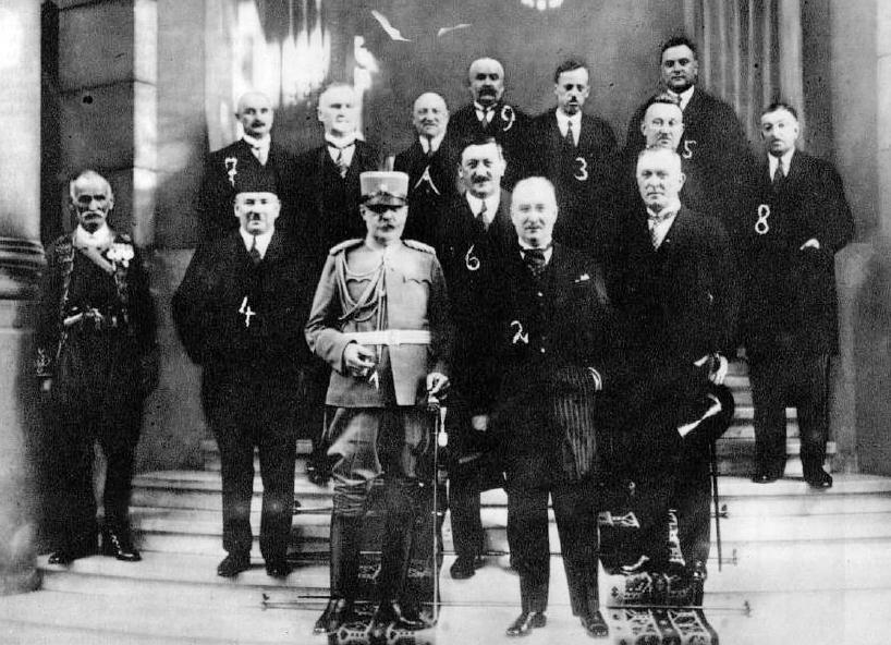 Jugoslovanska vlada, ki jo je sestavil Anton Korošec. Na sliki so: Stevan Hadžić (1), Niko Subotić (2), Milan Grol (3), Mehmed Spaho (4), Stjepan Barić (5), Grga Budislav Anđelinović (6), Daka Popović (7), Dragiša Cvetković (8), Petar T. Marković (9).